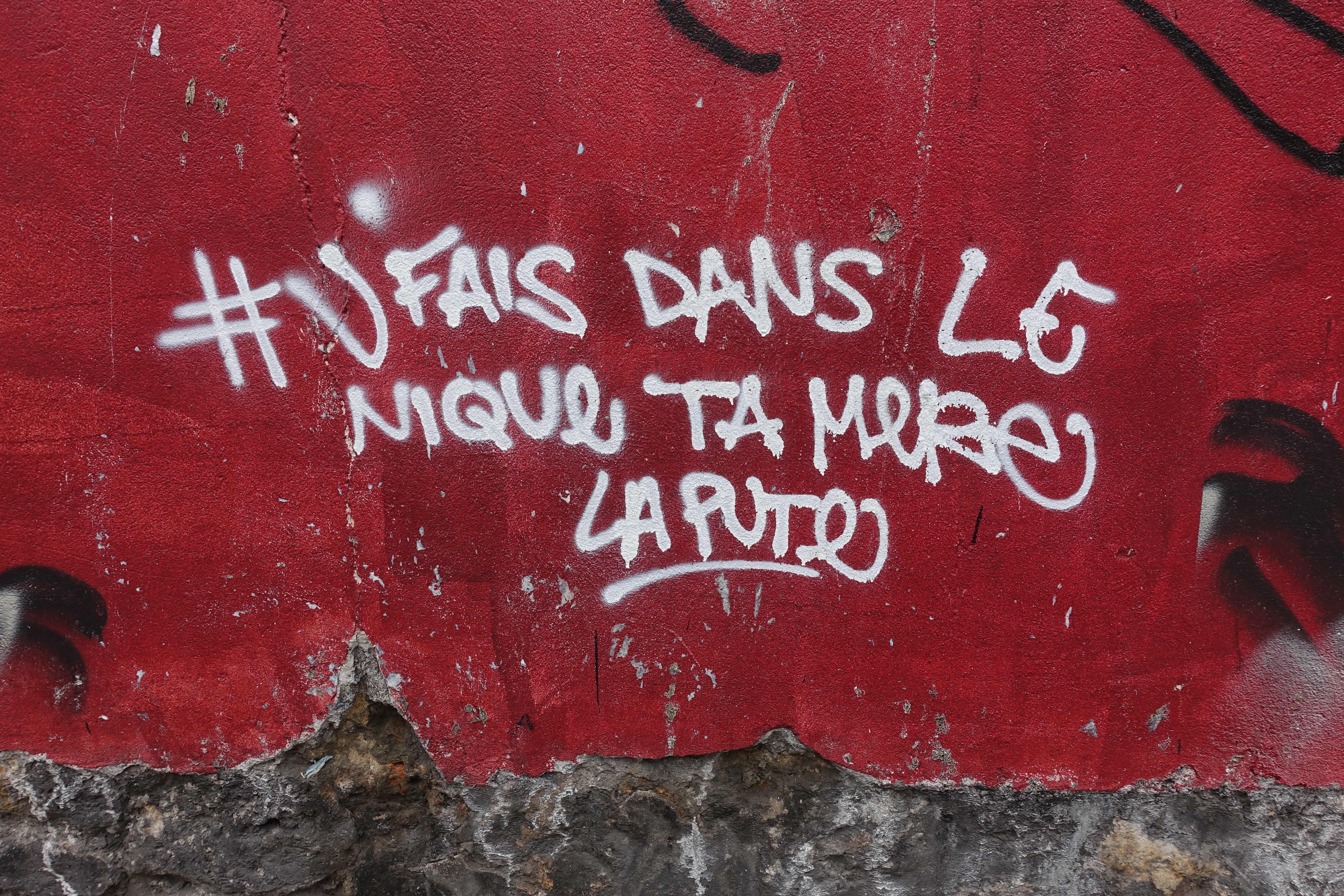 "Nique ta mère la pute" @ Paris